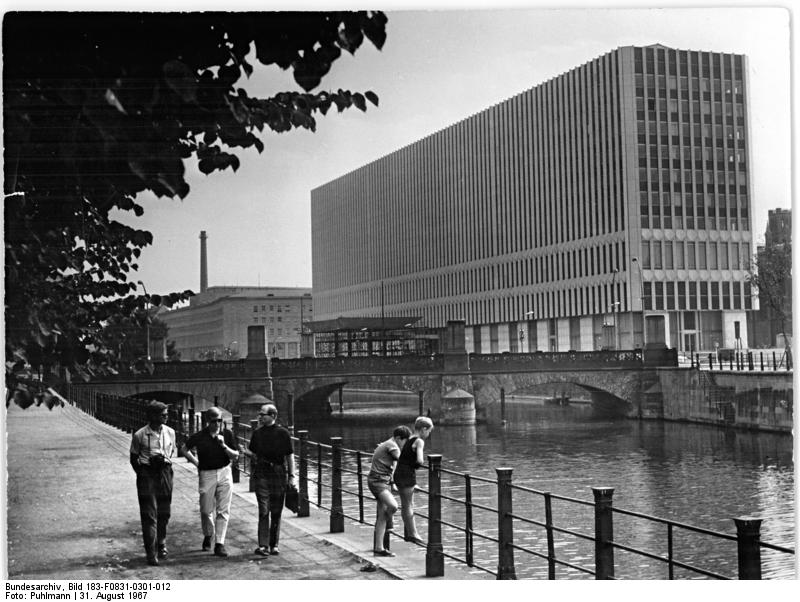 Berlin, Aussenministerium, Brücke, Spree Zentralbild Puhlmann-31.8.1967 Berlin-Die Hauptstadt der DDR im Sommer 1967.Seit Anfang des Jahres 1967 bestimmt der imposante Bau des Ministeriums für Auswärtige Angelegenheiten die Südwestseite des Marx-Engels-Platzes.Das Gebäude am Kupfergraben ruht auf einer mächtigen,1.10m dicken Betonplatte,ist 145m lang und 44m hoch.Die Stahl-Aluminium-Fassaden erheben sich kontrastreich und lenken die Aufmerksamkeit auf dieses repräsentative Gebäude.